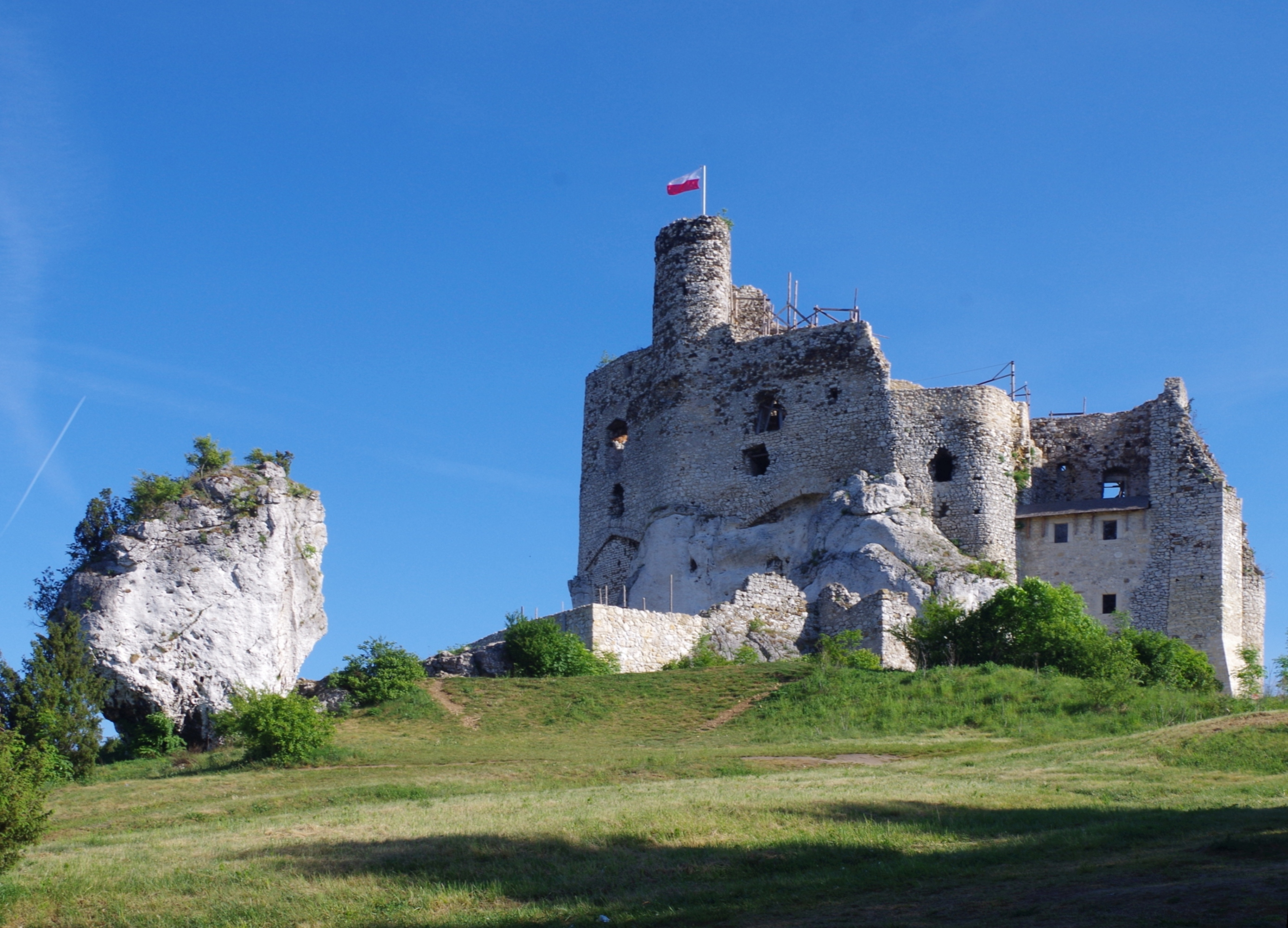 Zamek w Mirowie i skała Grzyb